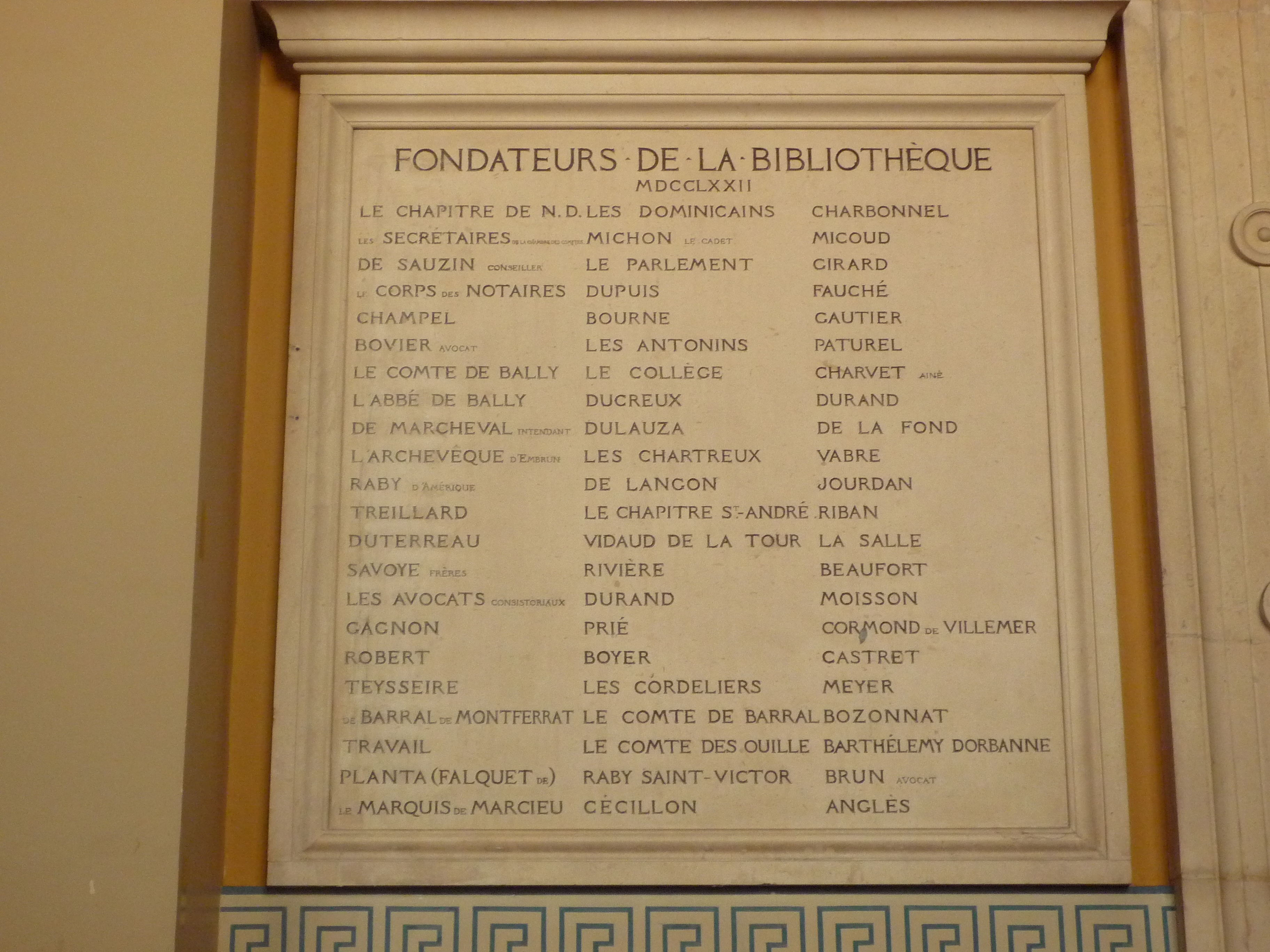 Plaque des fondateurs de la bibliothèque (l'institution) de Grenoble en 1772, posée dans l'ancien musée-bibliothèque de la ville à son ouverture en 1872.